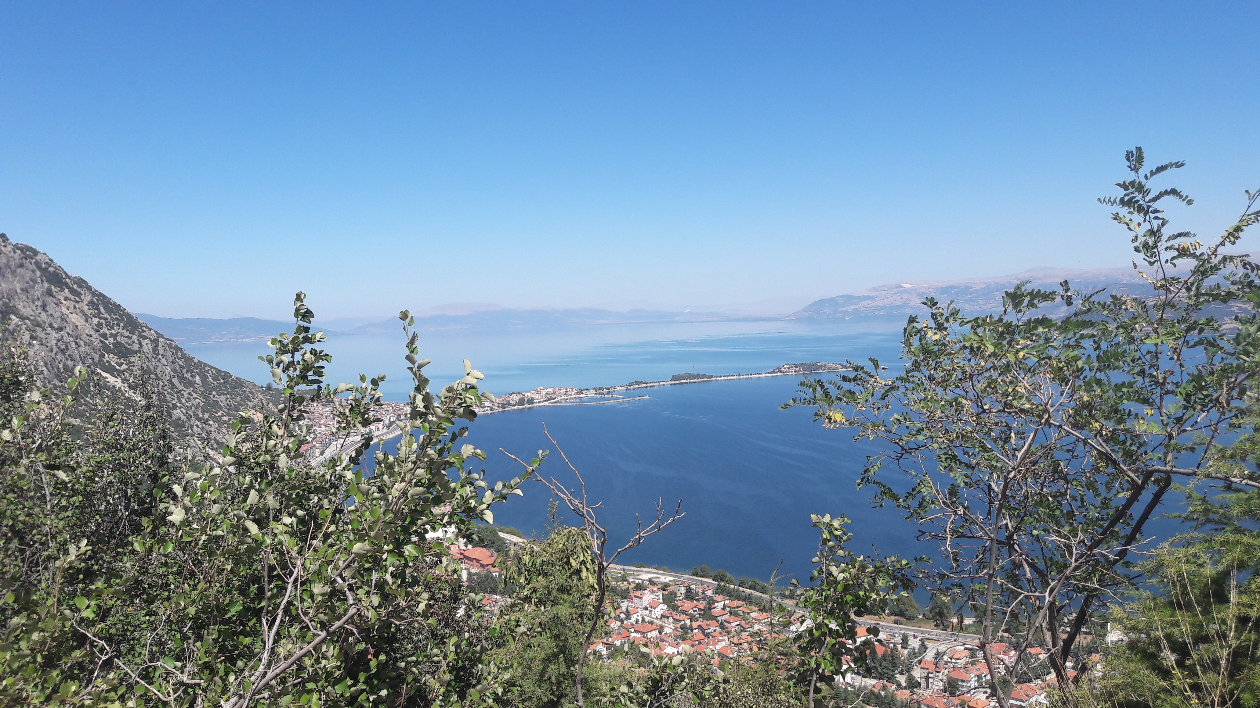 Eğirdir Lake